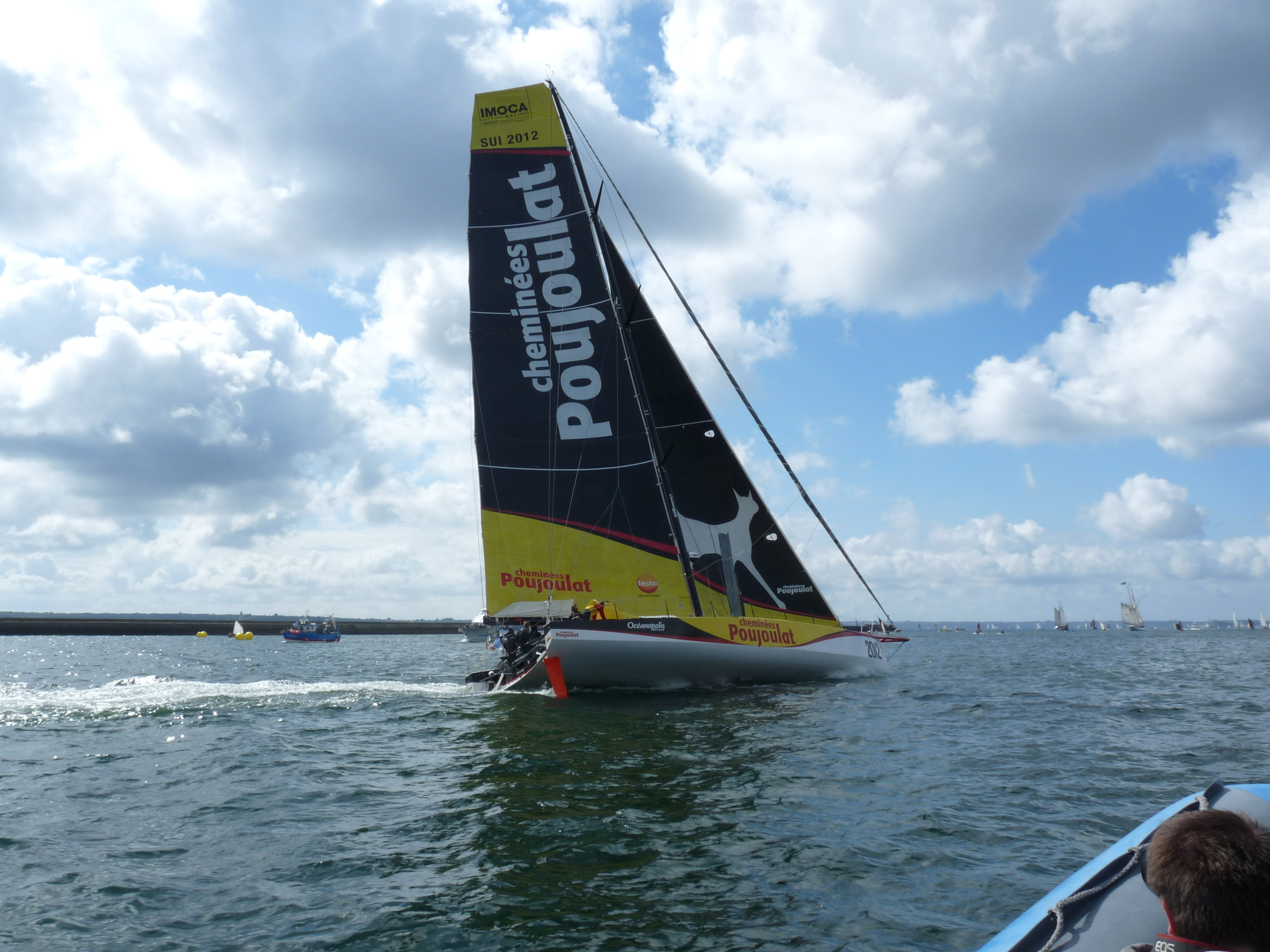 Les Tonnerres de Brest 2012 : Cheminées Poujoulat, skippé par Bernard Stamm, sous voile dans la rade abri